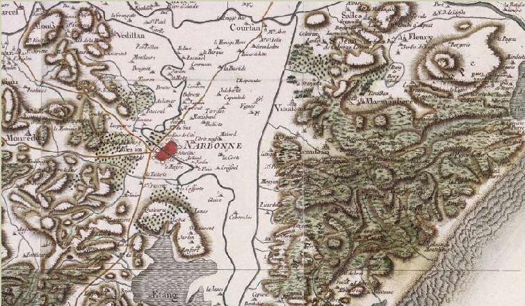 Carte de Cassini de Narbonne vers 1780